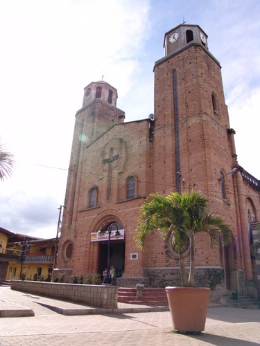 Fachada de la Iglesia de San Antonio de Padua de Yalí, Antioquia, Colombia